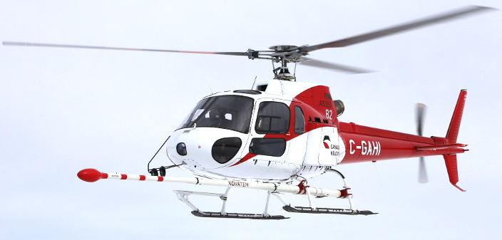 Hélicoptère modifié et équipé du stinger de Novatem (STC Novatem Inc.)